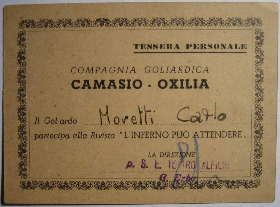 Carte de membre de la troupe de théâtre goliardique Camasio-Oxilia de Turin (Italie).